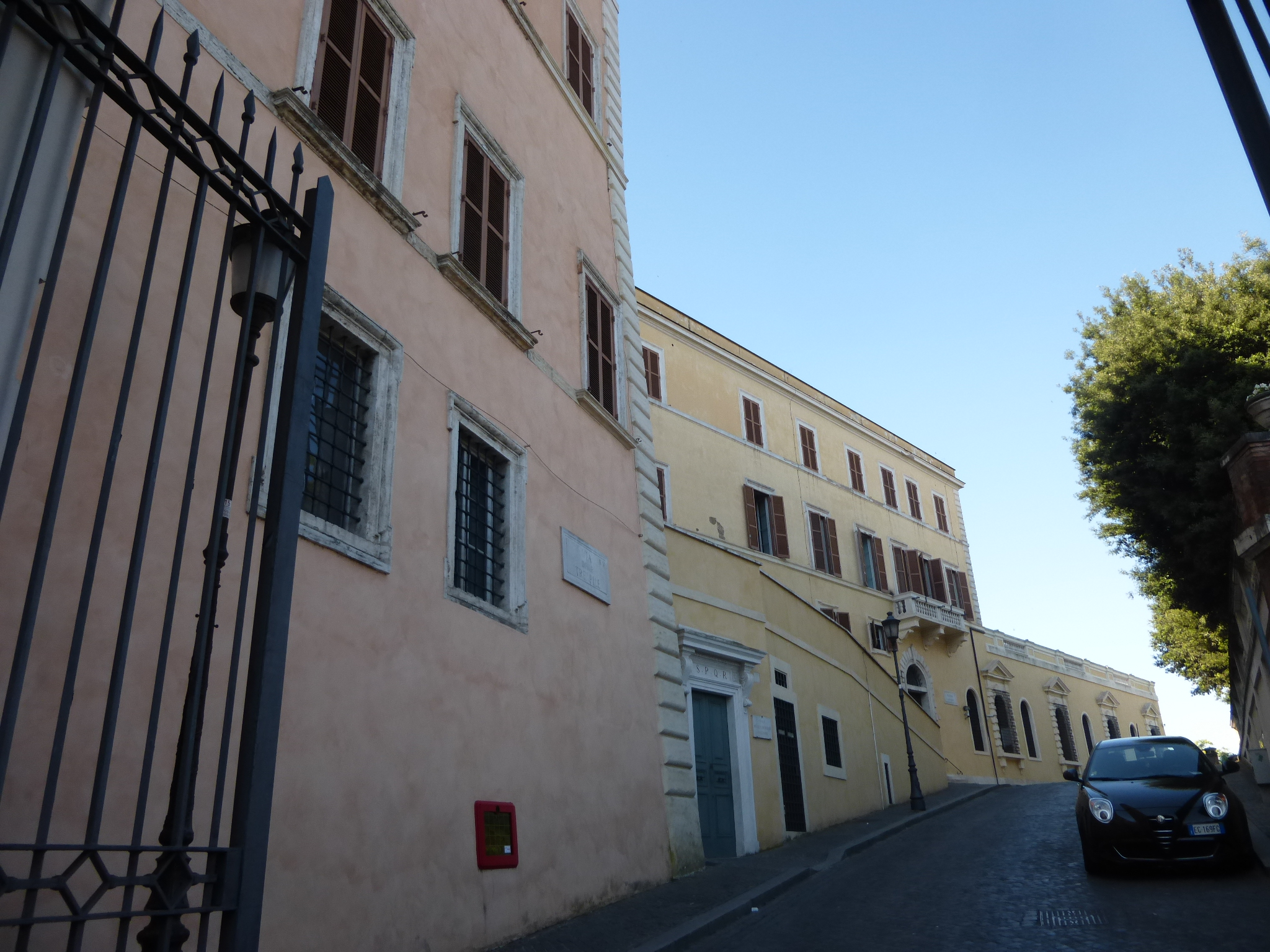 Roma, Campidoglio. Via delle Tre pile e palazzo Caffarelli.